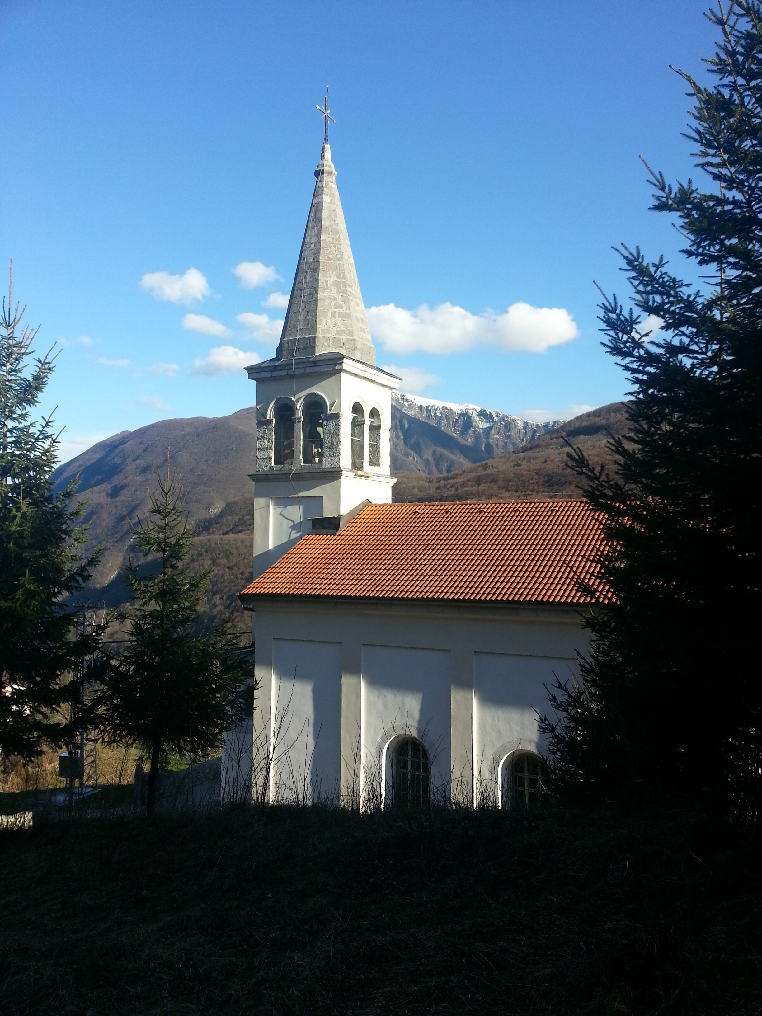 Cerkev sv. Katarine v Borjani.